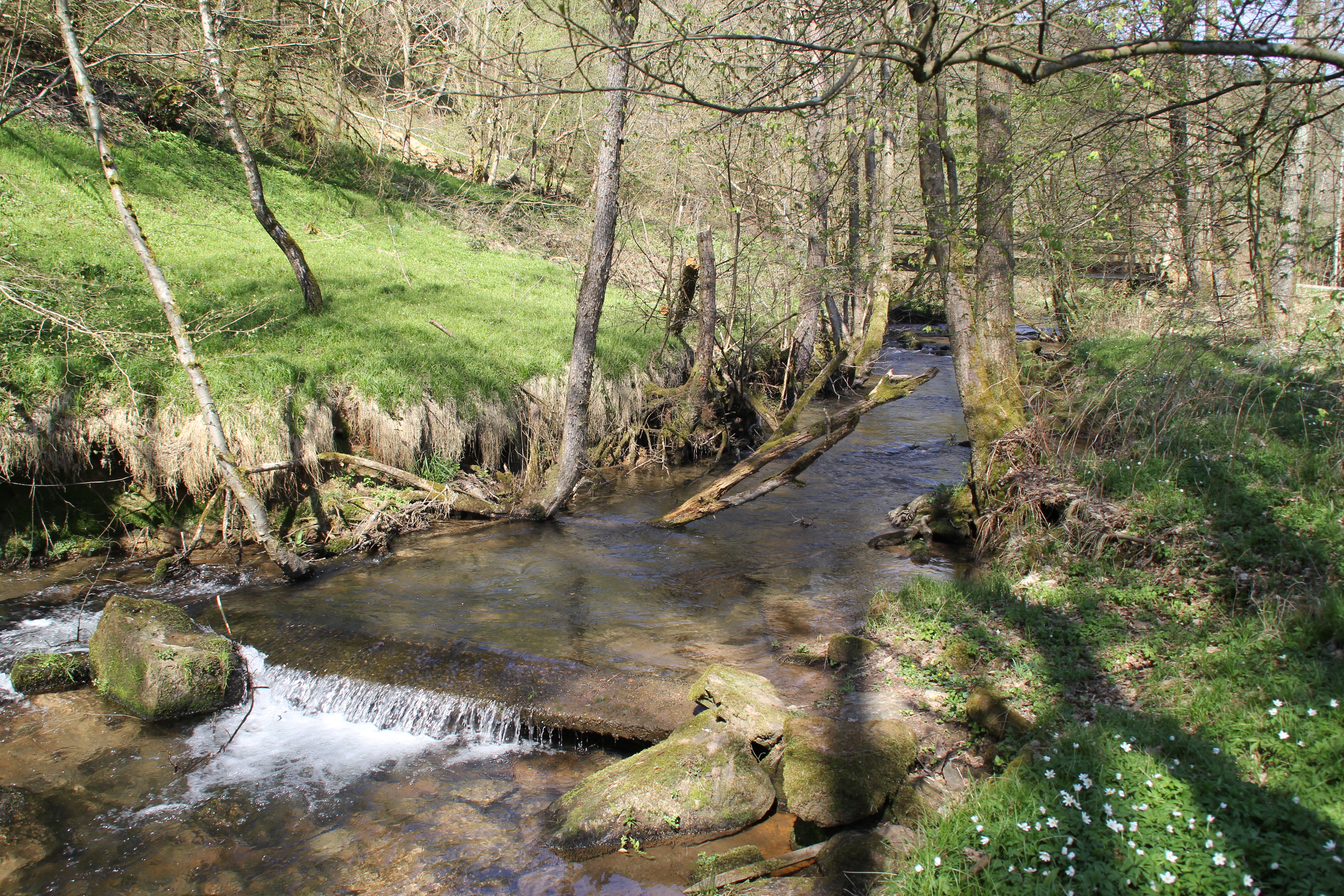 Der Aubach bei den Aubachseen (Auseen), Habichthal, Bayern